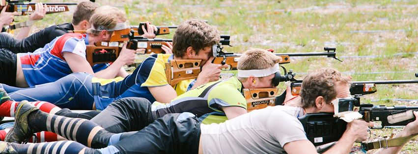 Skyttemomentet i mångkampen orienteringsskytte